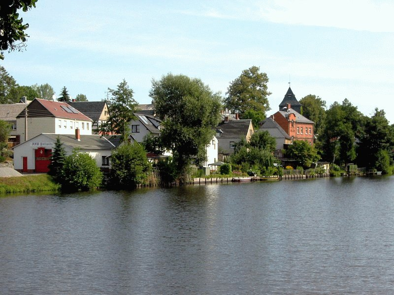 Ortsansicht von Pöllwitz (ein Ort in Thüringen, Deutschland) im Sommer 2003